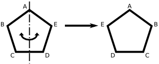 Riflessione di un pentagono regolare attorno ad uno degli assi di simmetria. È un elemento del gruppo diedrale . A regular pentagon reflection around a simmetry axis. It is an element of the dihedrial group .